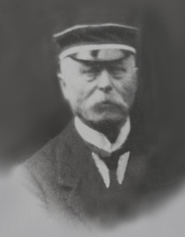 Porträtfotografie von Moritz Seydel, Mitglied des Preußischen Abgeordnetenhauses